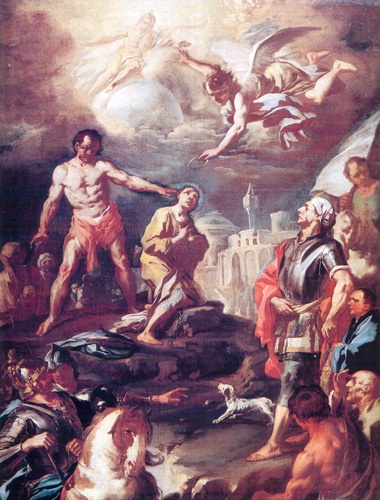 Décollation d’un saint par Lorenzo de Caro, huile sur toile, 98 x 75 cm, collection particulière.